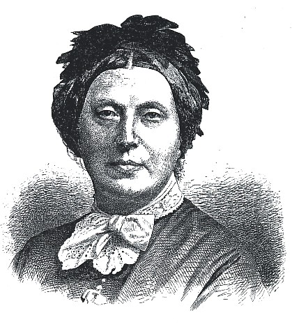 Portrait der Jugendautorin Isabella Braun.